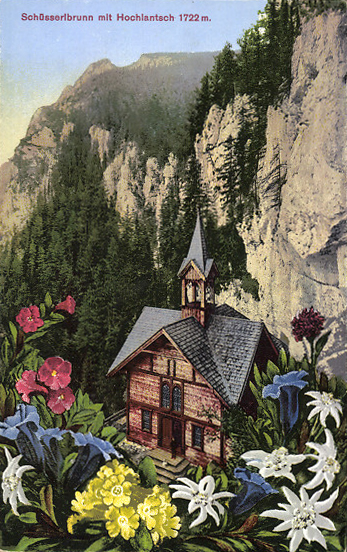 Anischtskarte von 1931: Schüsserlbrunnkapelle mit Hochlantsch im Hintergrund